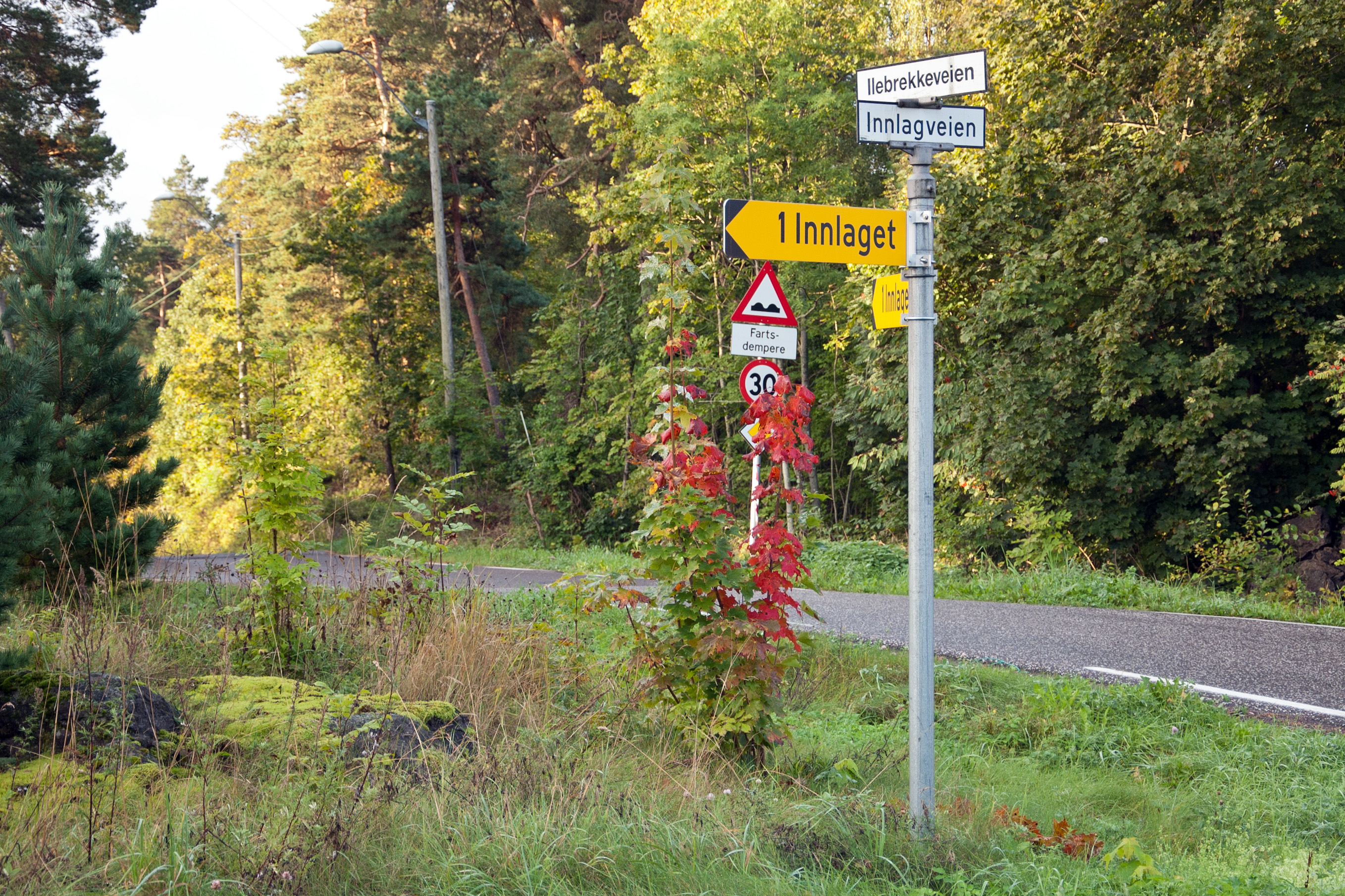 Fylkesvei 534 Ilebrekkeveien i Tønsberg, Vestfold